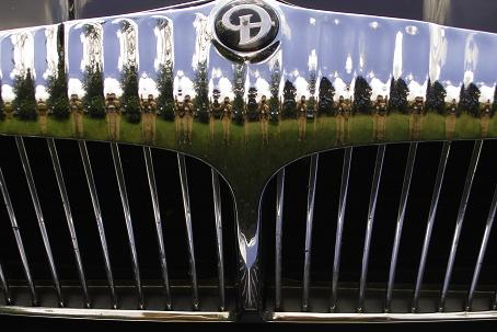 Daimler (Double Six) mit daimlertypischem Grill und ?D?